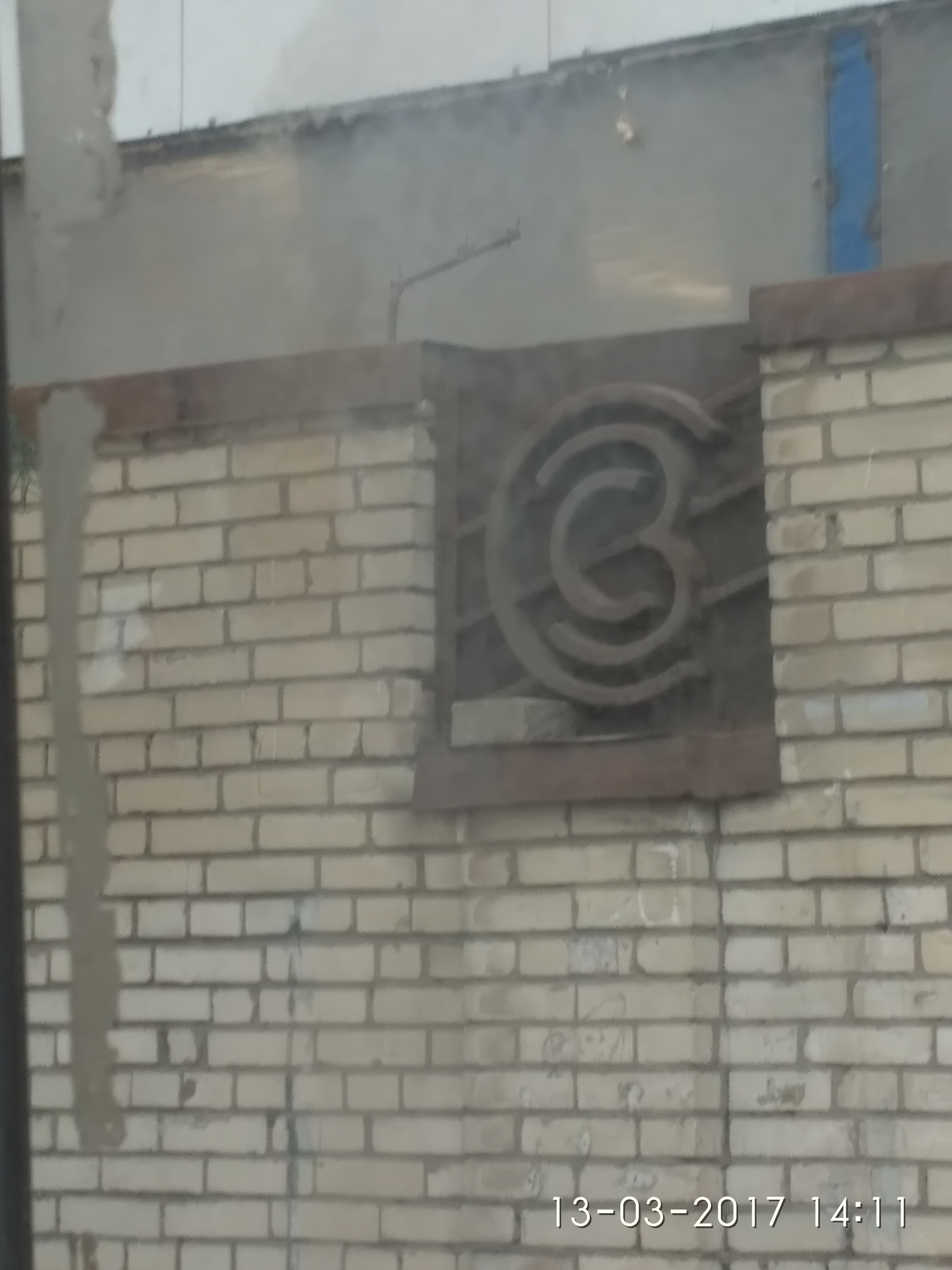 Логотип завода, оставшийся после его закрытия. Забор на Кондратьевском проспекте